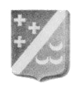 Герб Болгарского гусарского полка русской армии, 1776-1783.